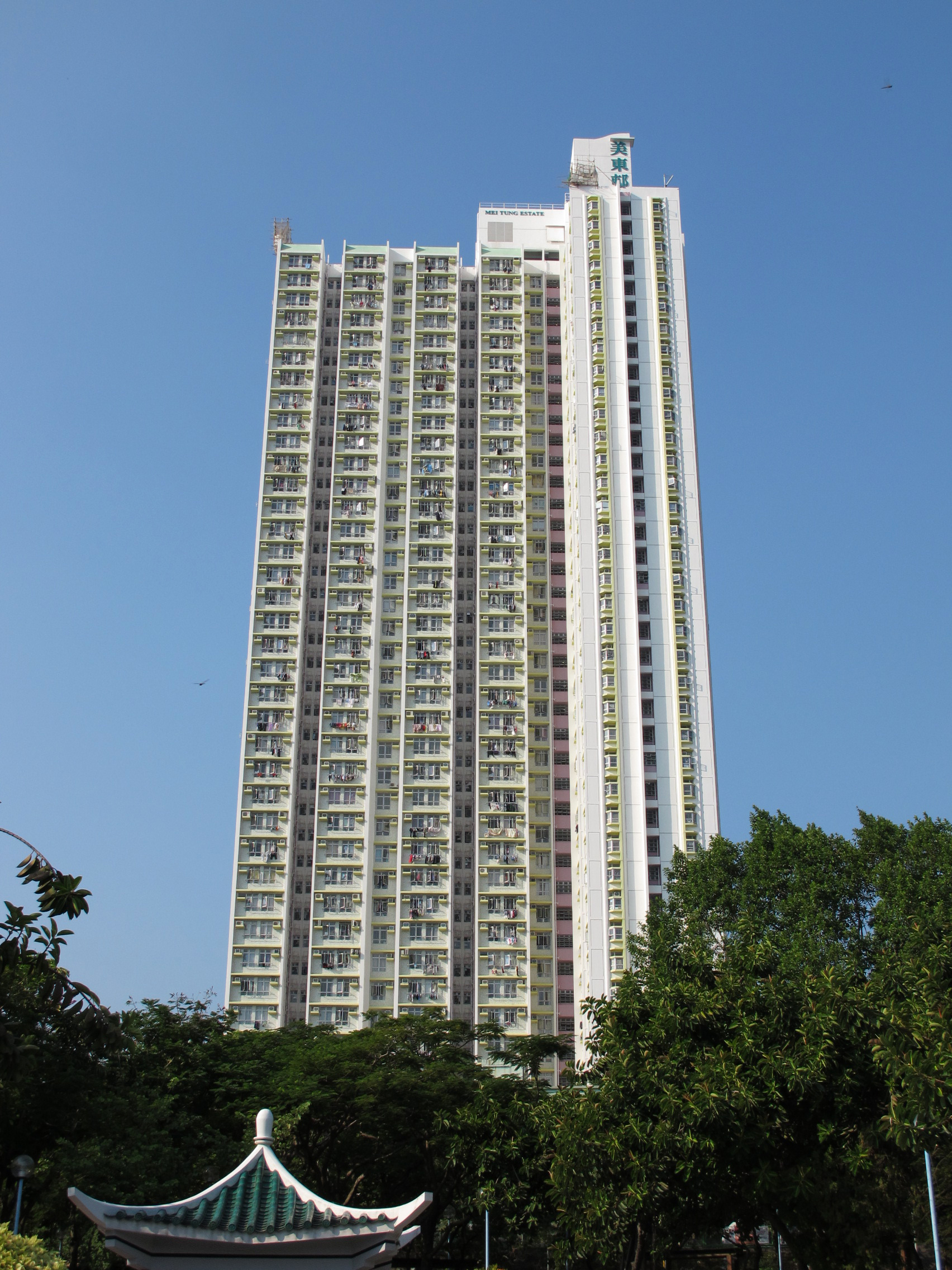 Mei Tung Estate Mei Yan House